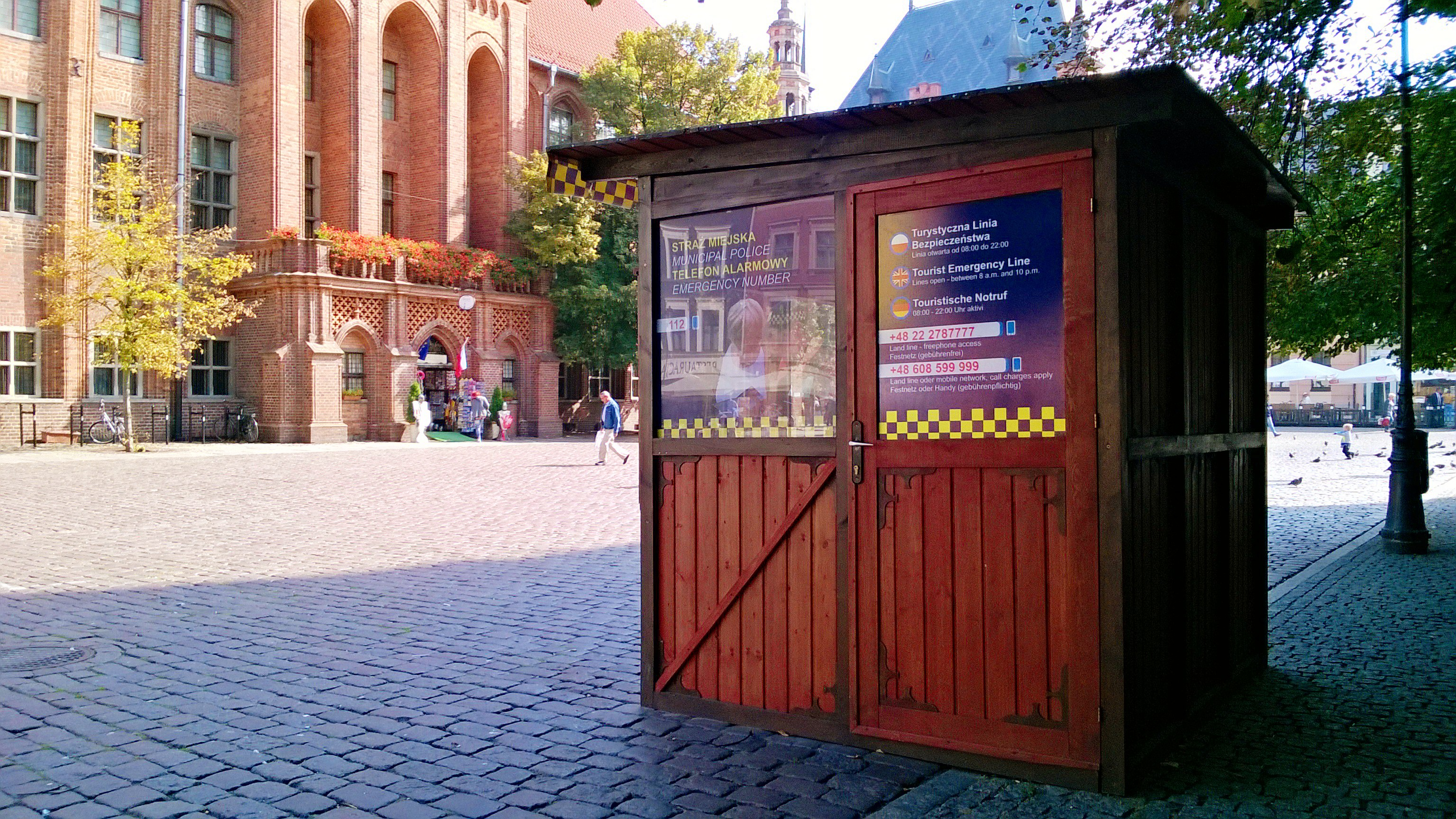 Straż Miejska w Toruniu